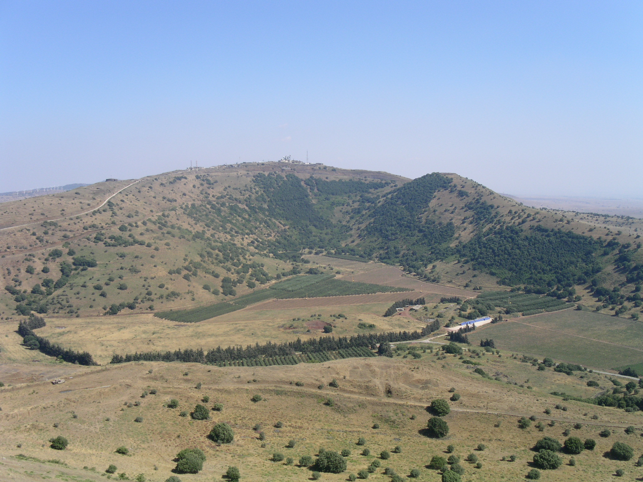 Golan Heights, Israel.